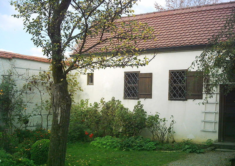 Zur Mönchszelle zugehöriger Garten des Kartäusermönches